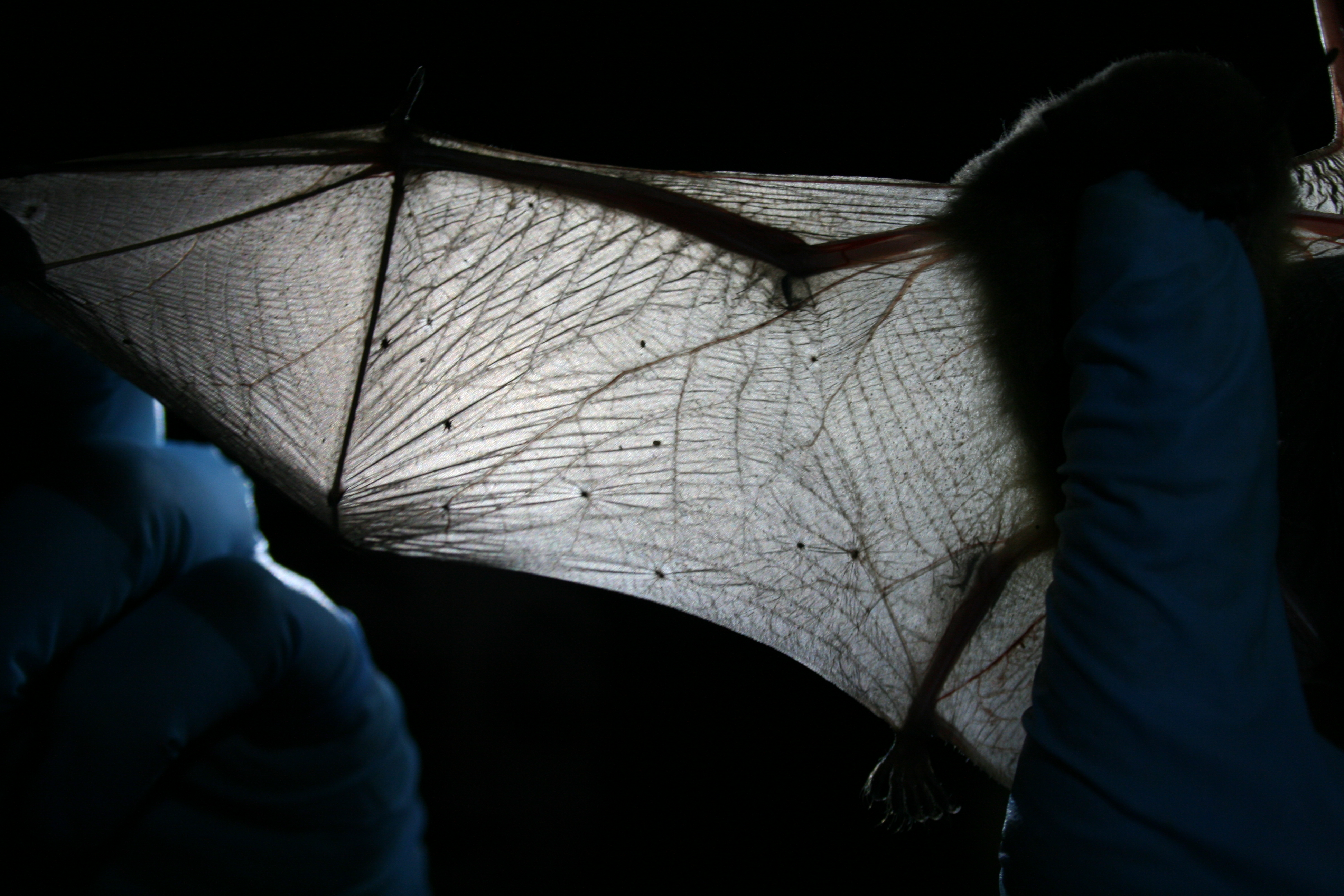 credit USFWS/Ann Froschauer